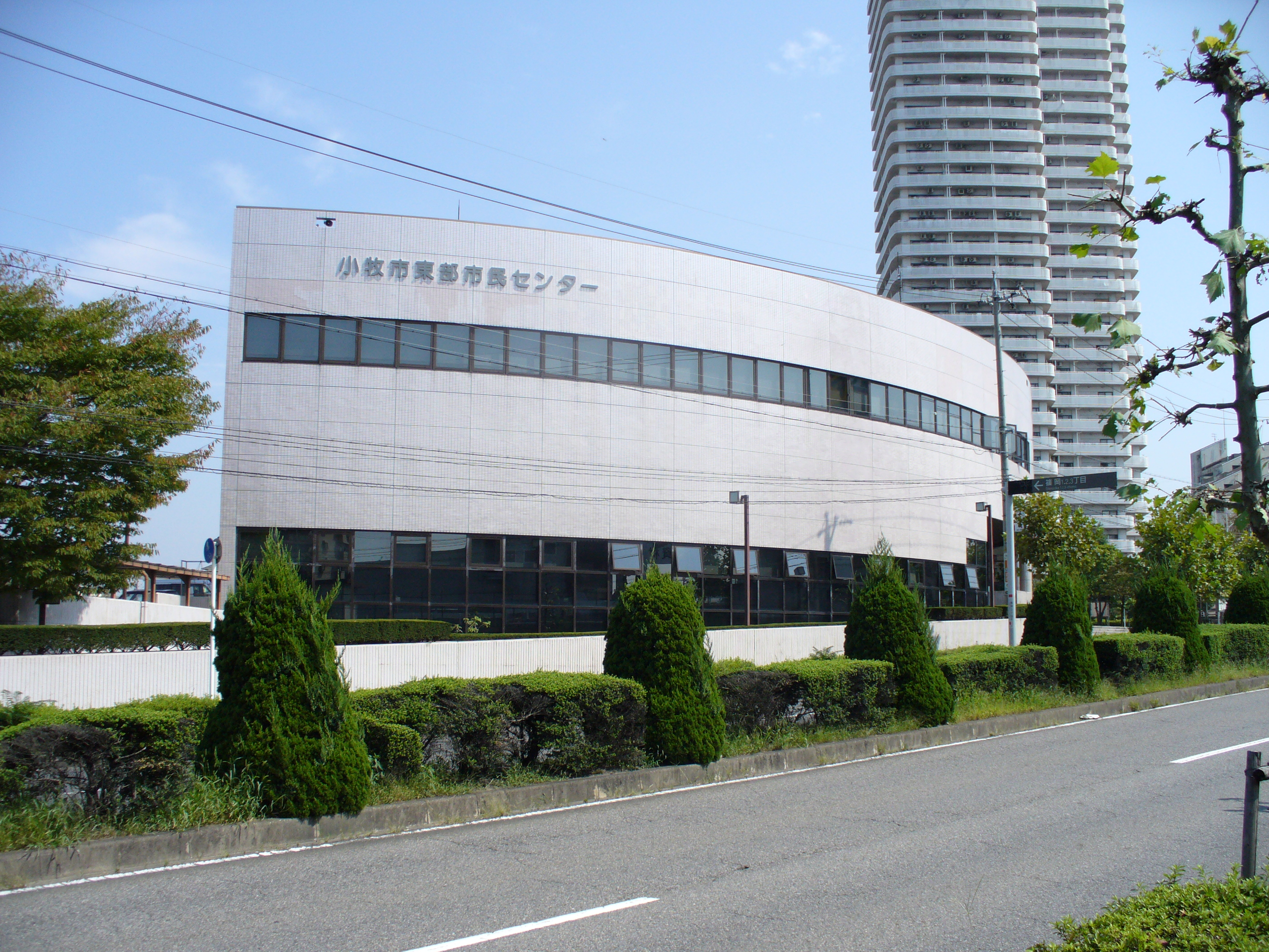 Komakishi_toubu_shimin_Centre